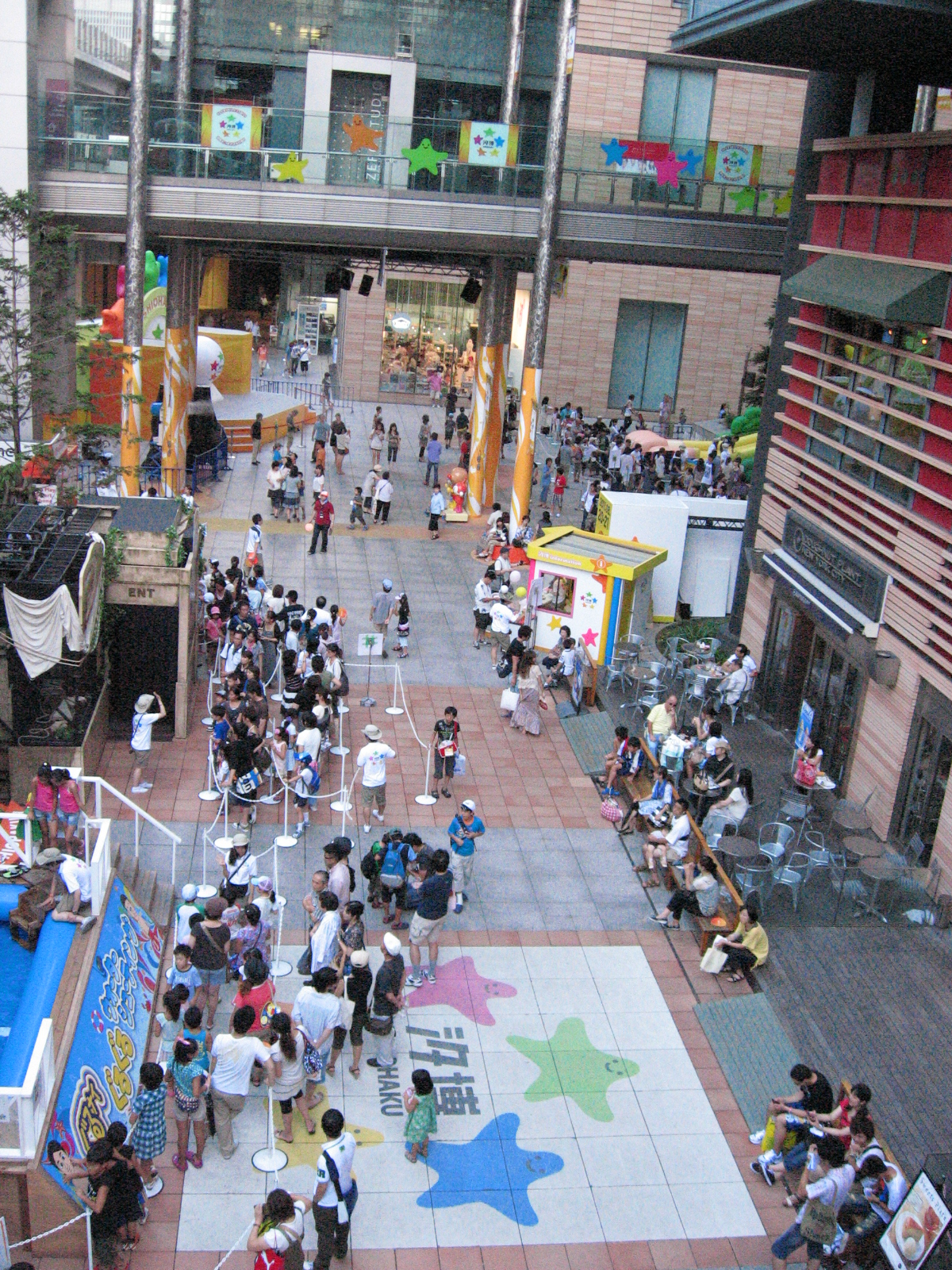 日本テレビの夏イベント『汐博2011』より